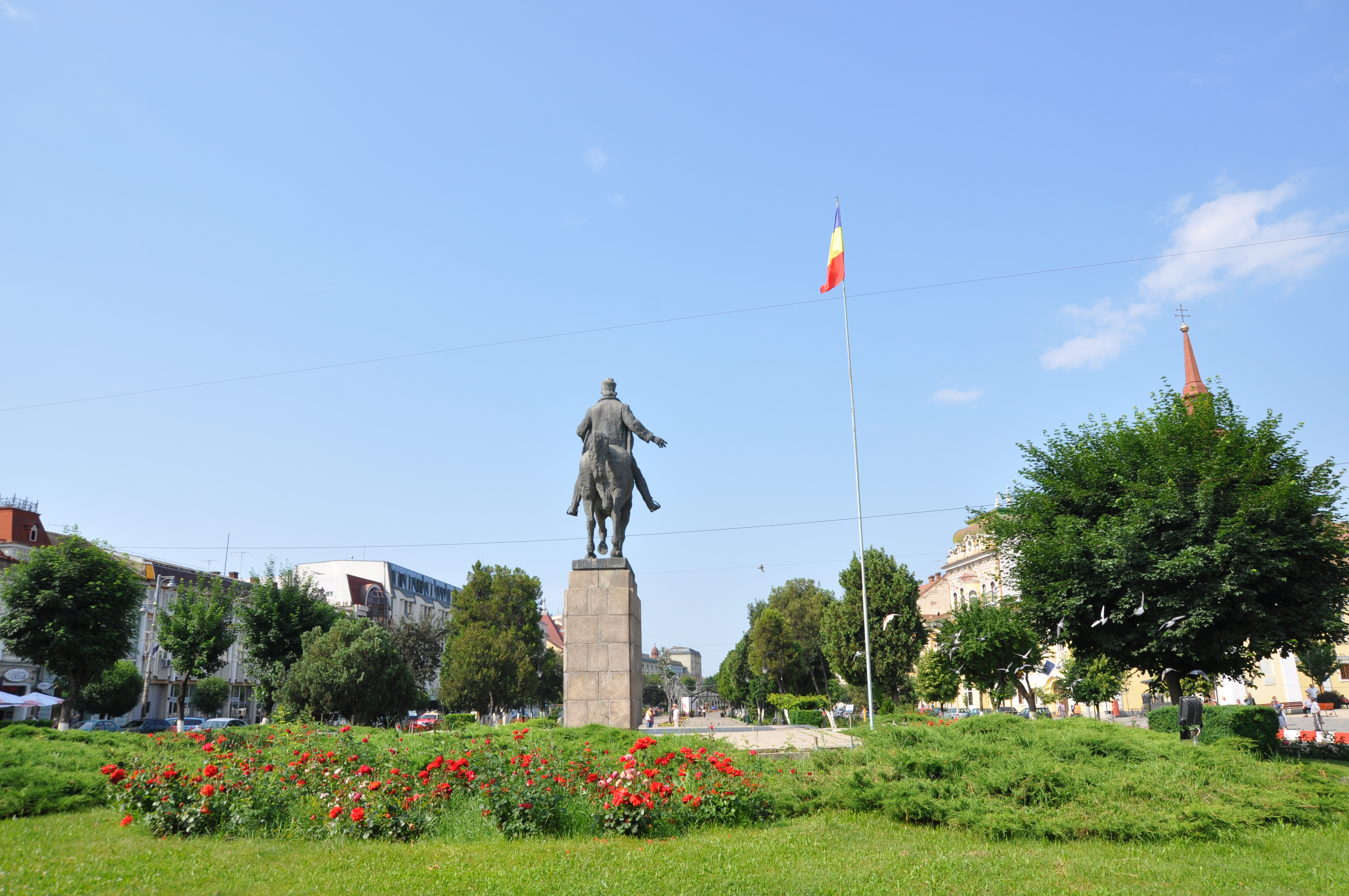 Erdély, Marosvásárhely